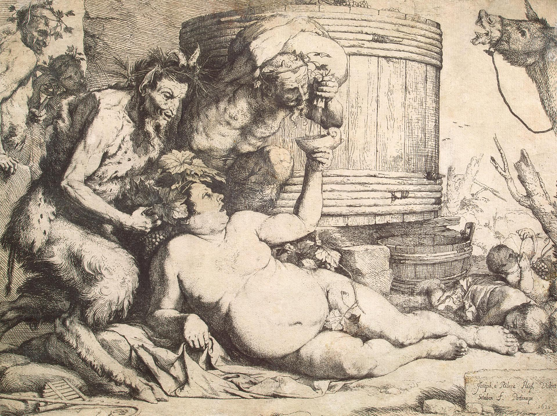 Рибера Силен: офорт